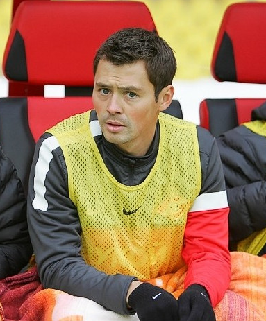 Динияр Билялетдинов на скамейке запасных